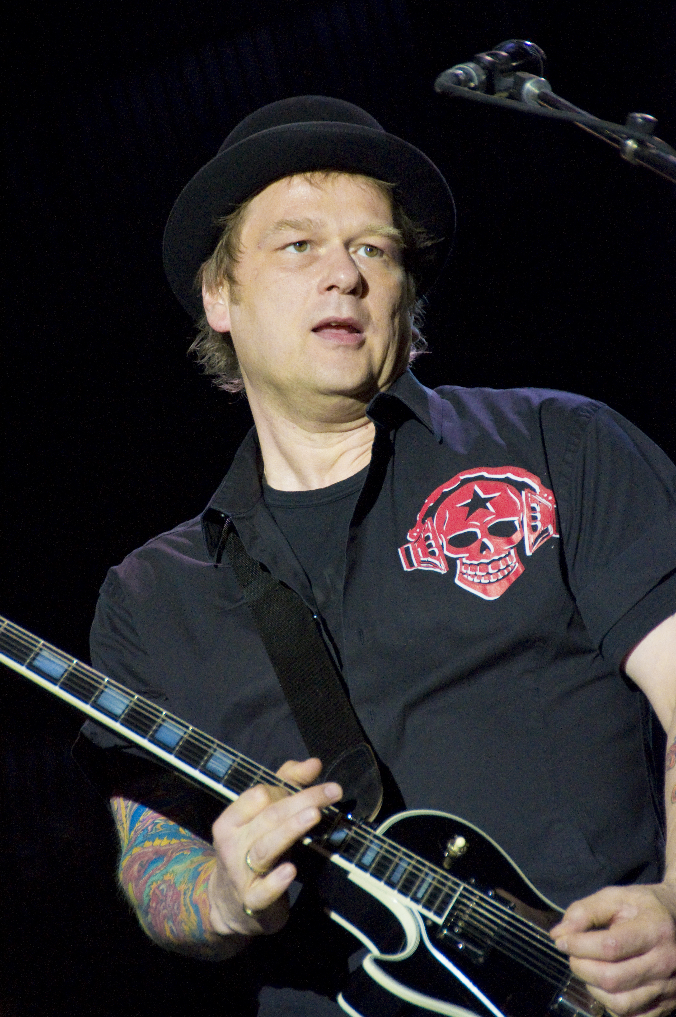 Die Bühne betraten die Toten Hosen kurz nach 21 Uhr. Die Punk-Veteranen spielten ihre grossen Hits, darunter natürlich «Alles aus Liebe», «Hier kommt Alex» und «Paradies». Feierabend machten die Düsseldorfer nach rund zwei Stunden. Das Publikum war glücklich.